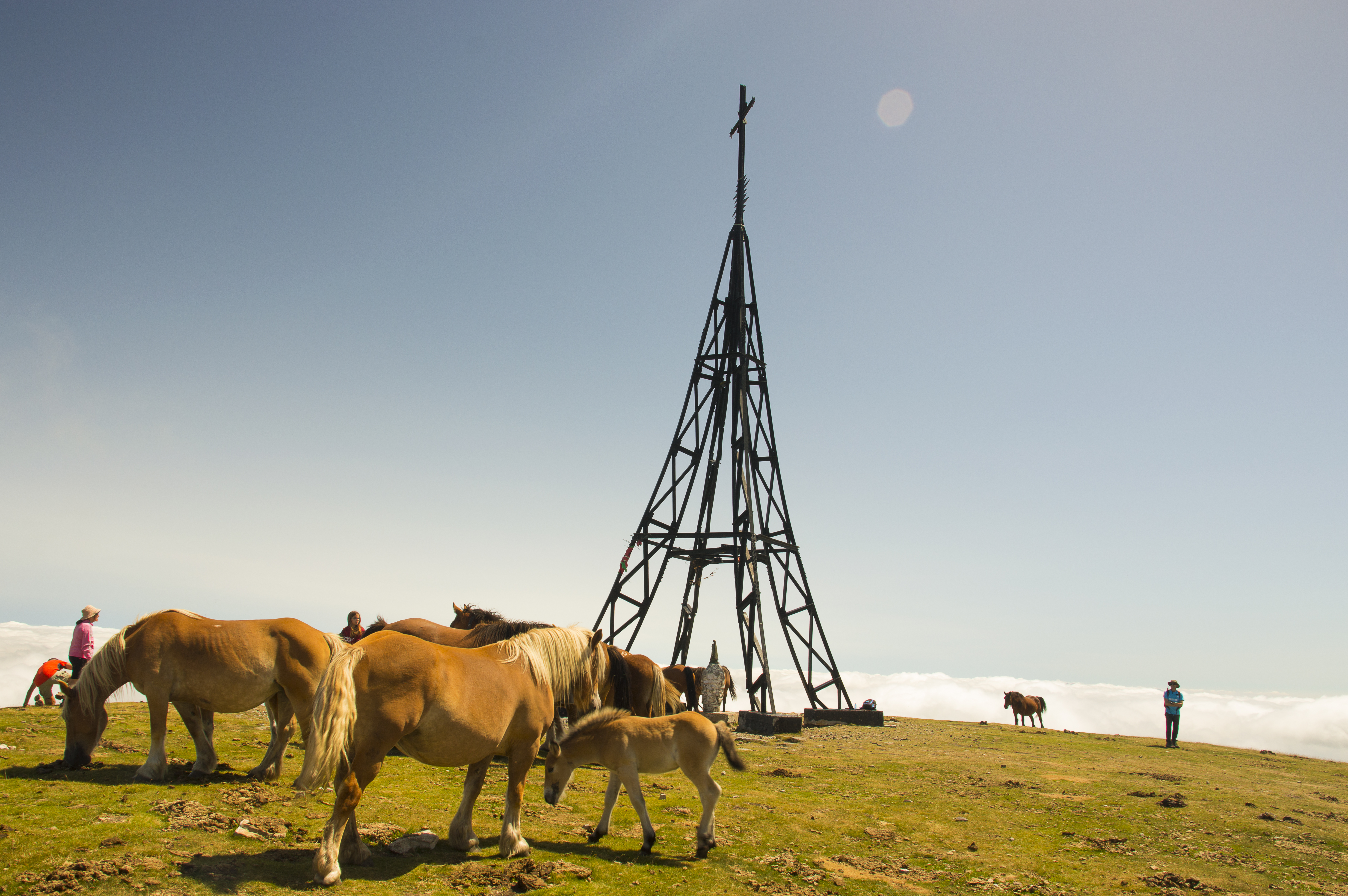 en la cruz de Gorbeia This is a photography of a Site of Community Importance in Spain with the ID: ES2110009. Natura2000 entry, EEA entry